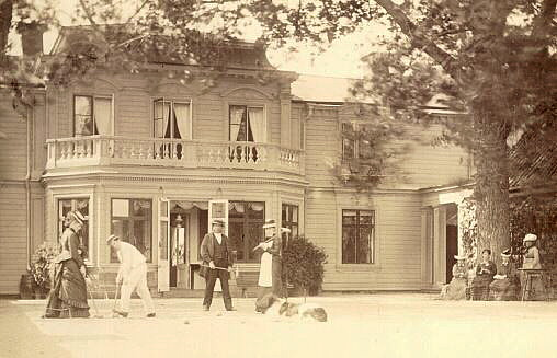 Krocketspel med barn och släktingar framför entrén till Tollare gård. I mitten dåvarande ägaren Anhelm Frestadius i mörk kostym och halmhatt.